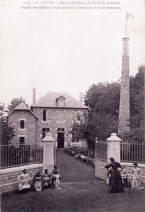 Le musée de Littry et l'école de dentelle.